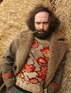 Mikel Urmeneta, fundador de Kukuxumusu.